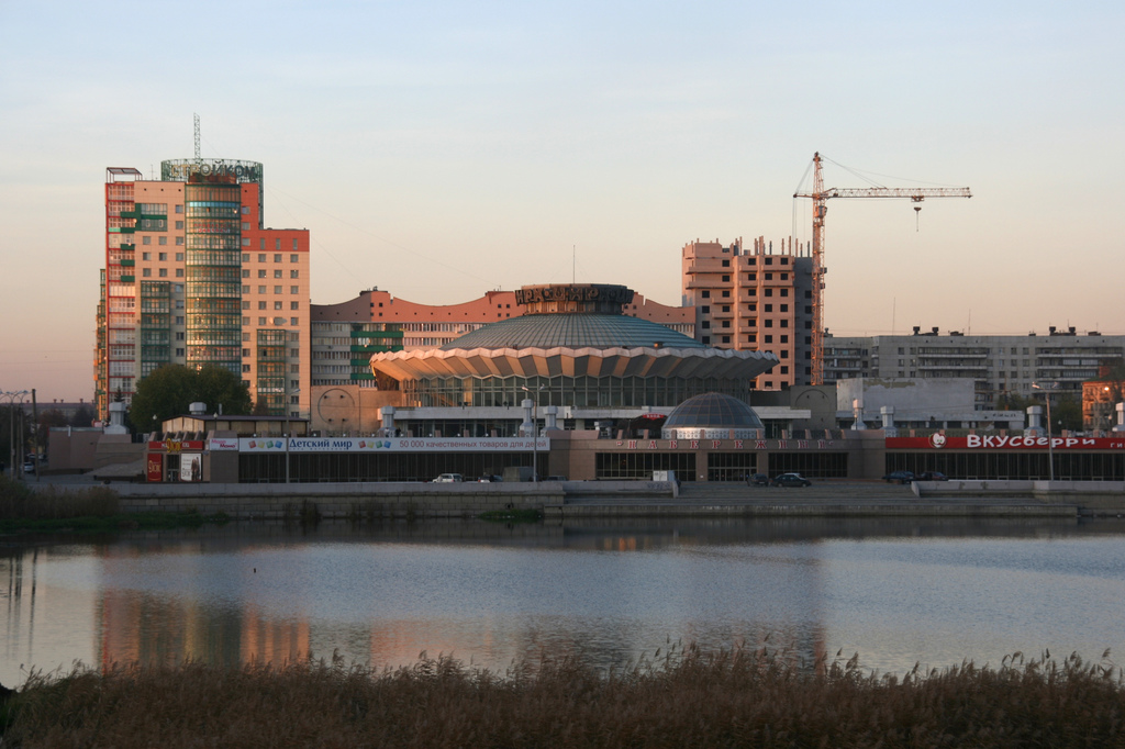 Челябинский цирк.